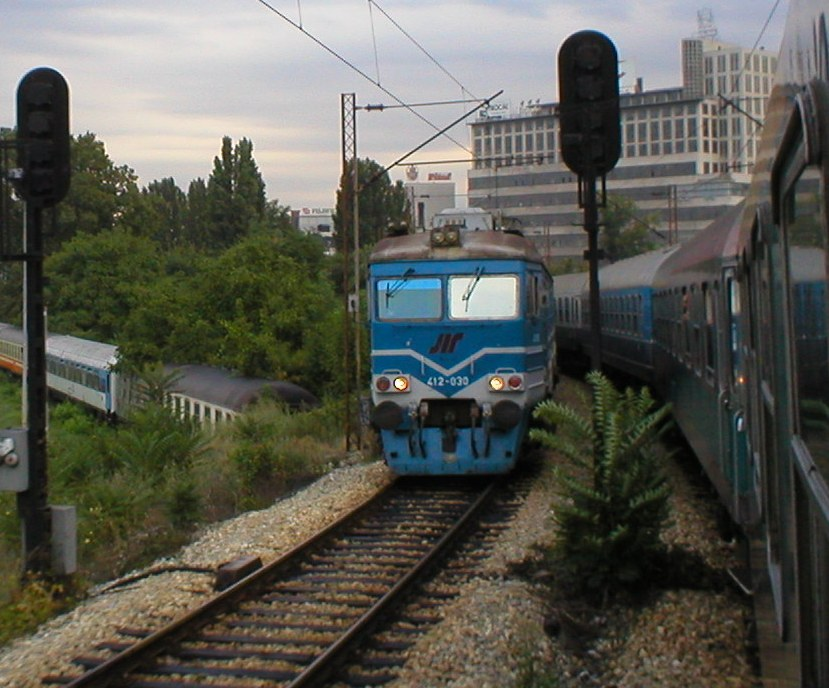 JŽ 461 series train in Belgrade, Serbia